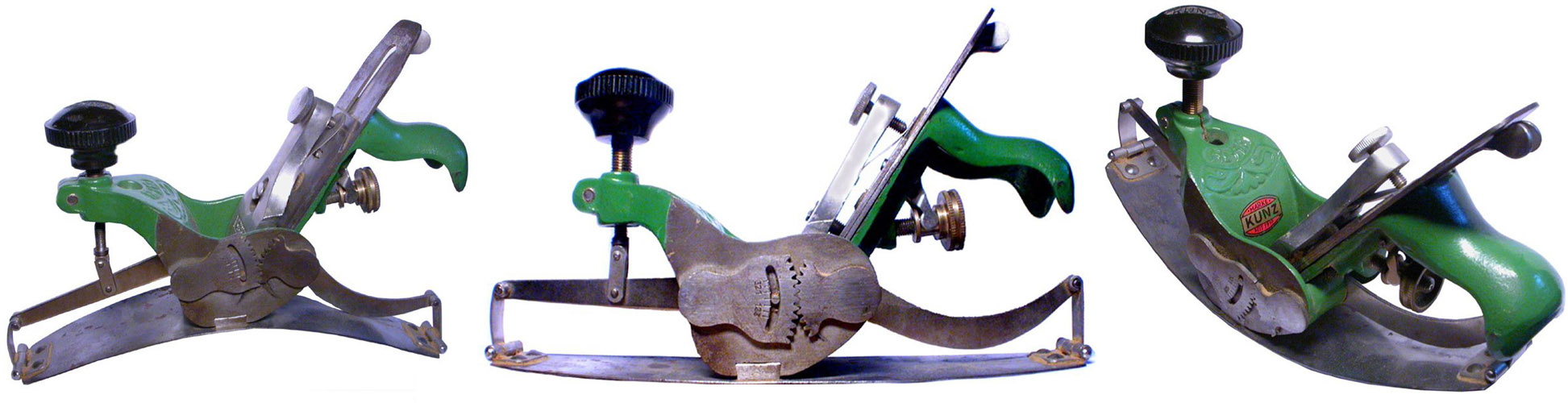 Schiffhobel-Marke-KUNZ-w